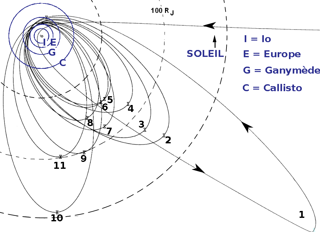 Orbites de la mission primaire de la sonde Galileo. Libellés en français